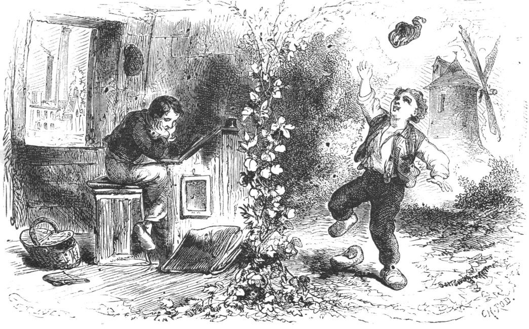 Illustration de J. Gerlier pour la Fortune de Gaspard, Paris, Hachette, 1876